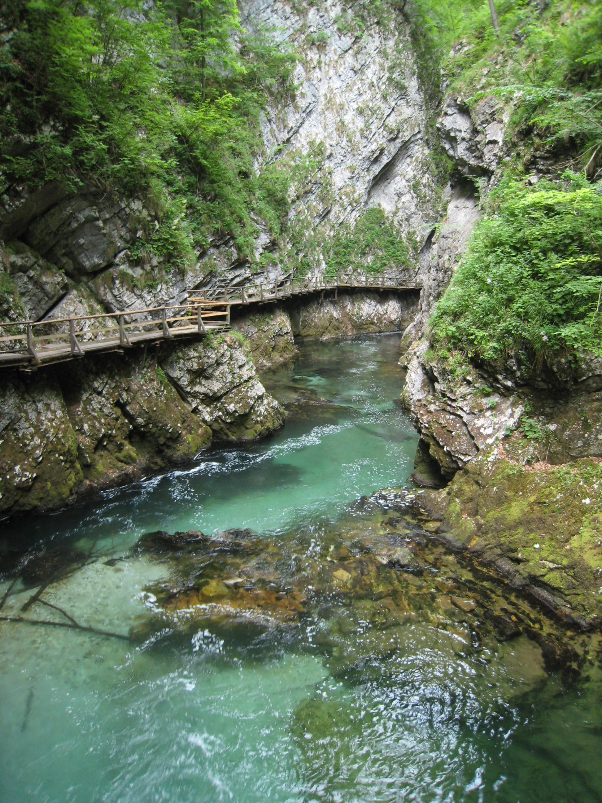 Blejski Vintgar, Slovenia.